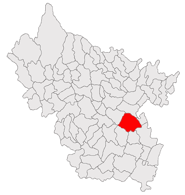 Categorie:Hărţi ale judeţului Buzău